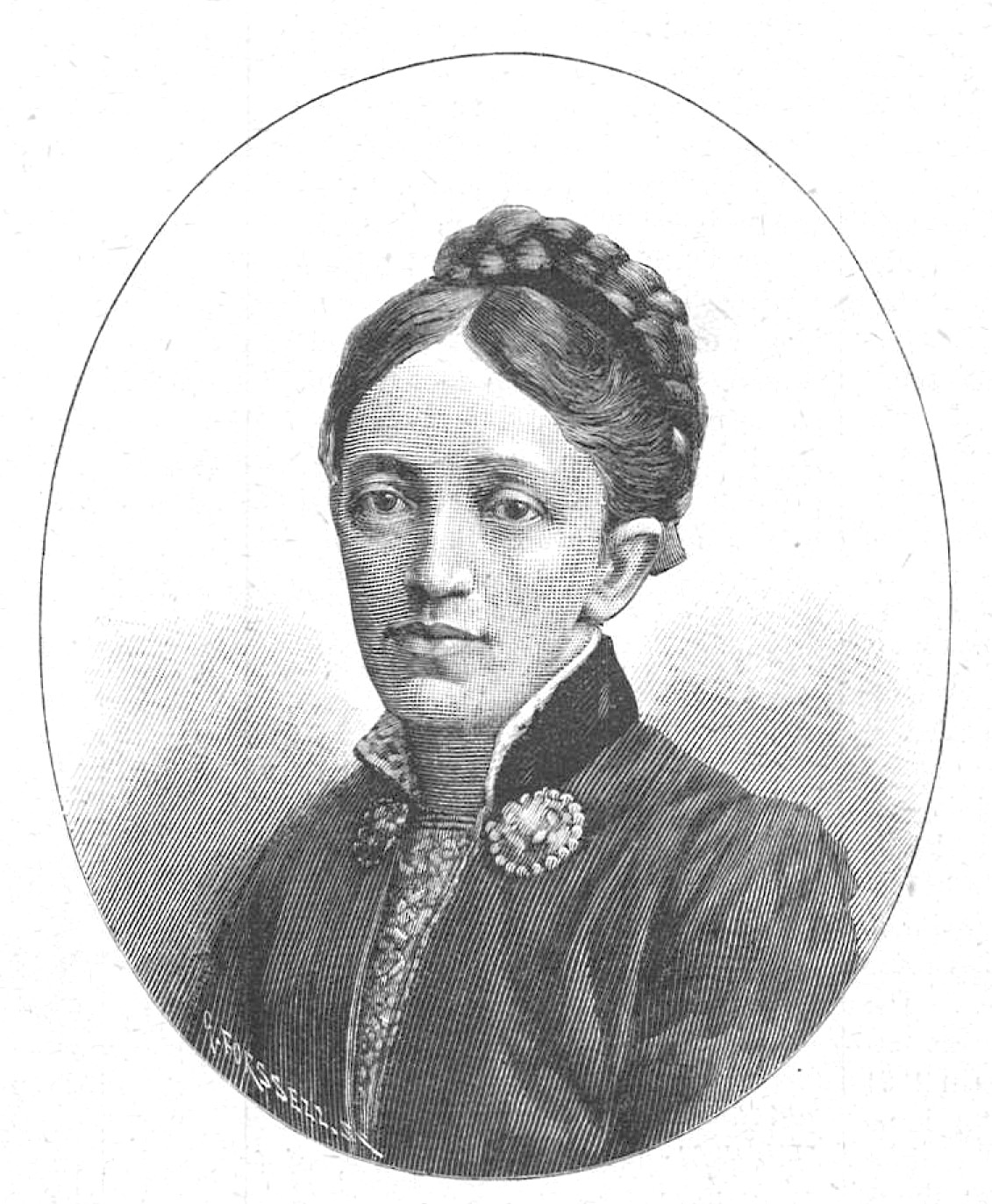 Thora Kulle (1849-1939)